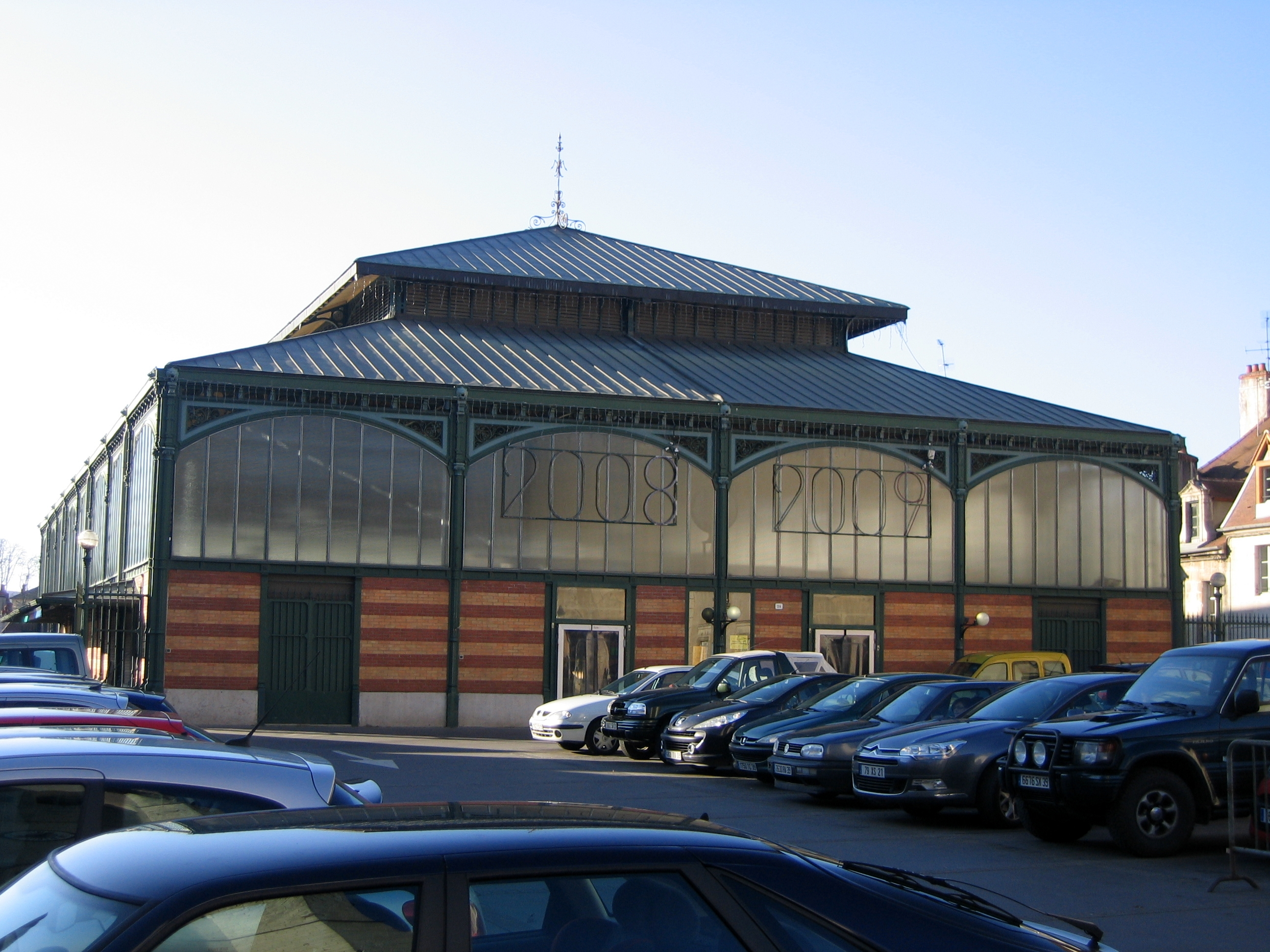 Le marché couvert de Dole